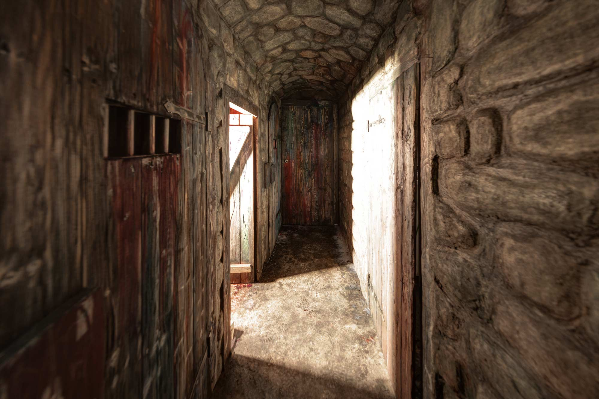 Der Escape Room "Der Henker" beim Anbieter House of Tales in Berlin.